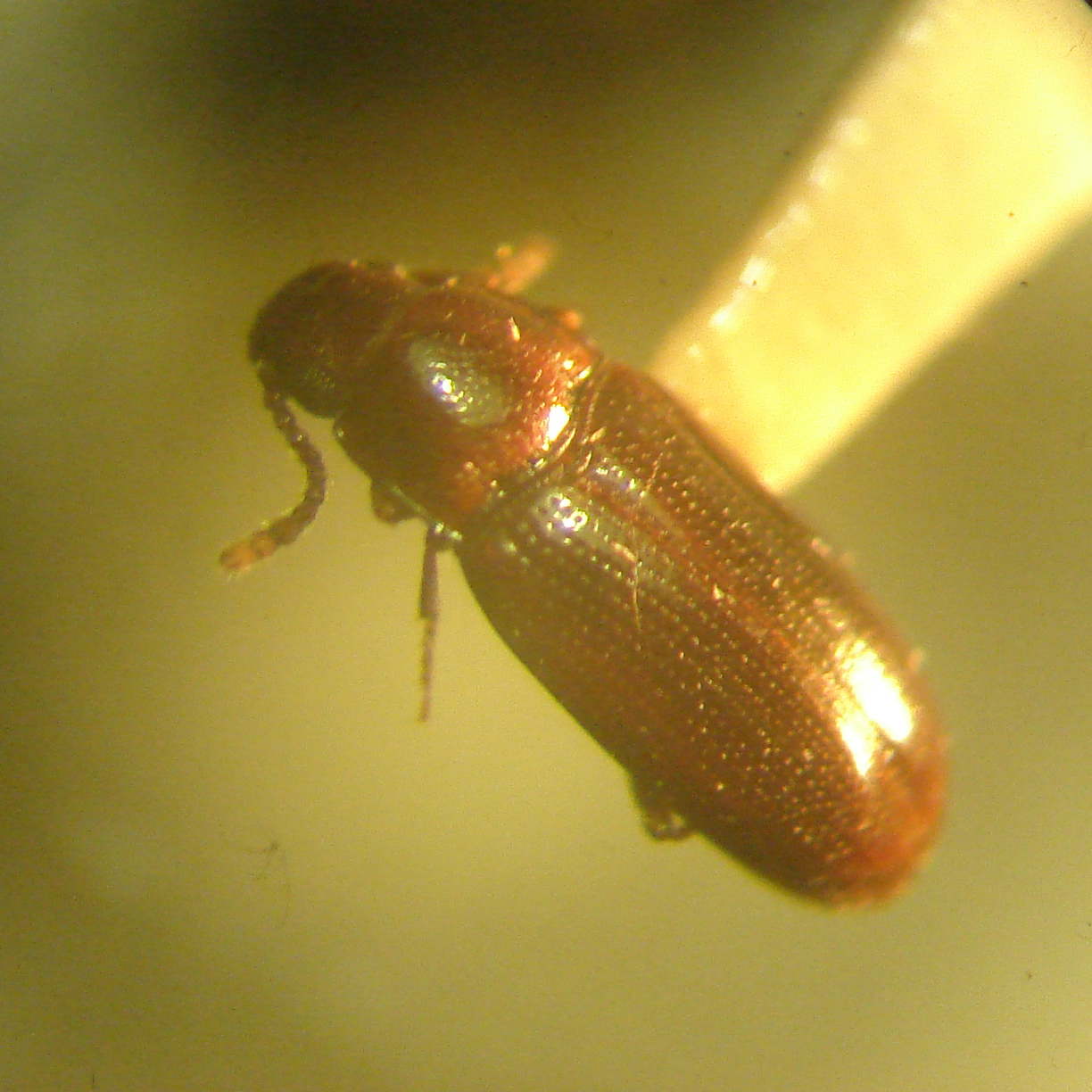 Pharaxonotha_kirschii, foto digital con microscopio estéreo